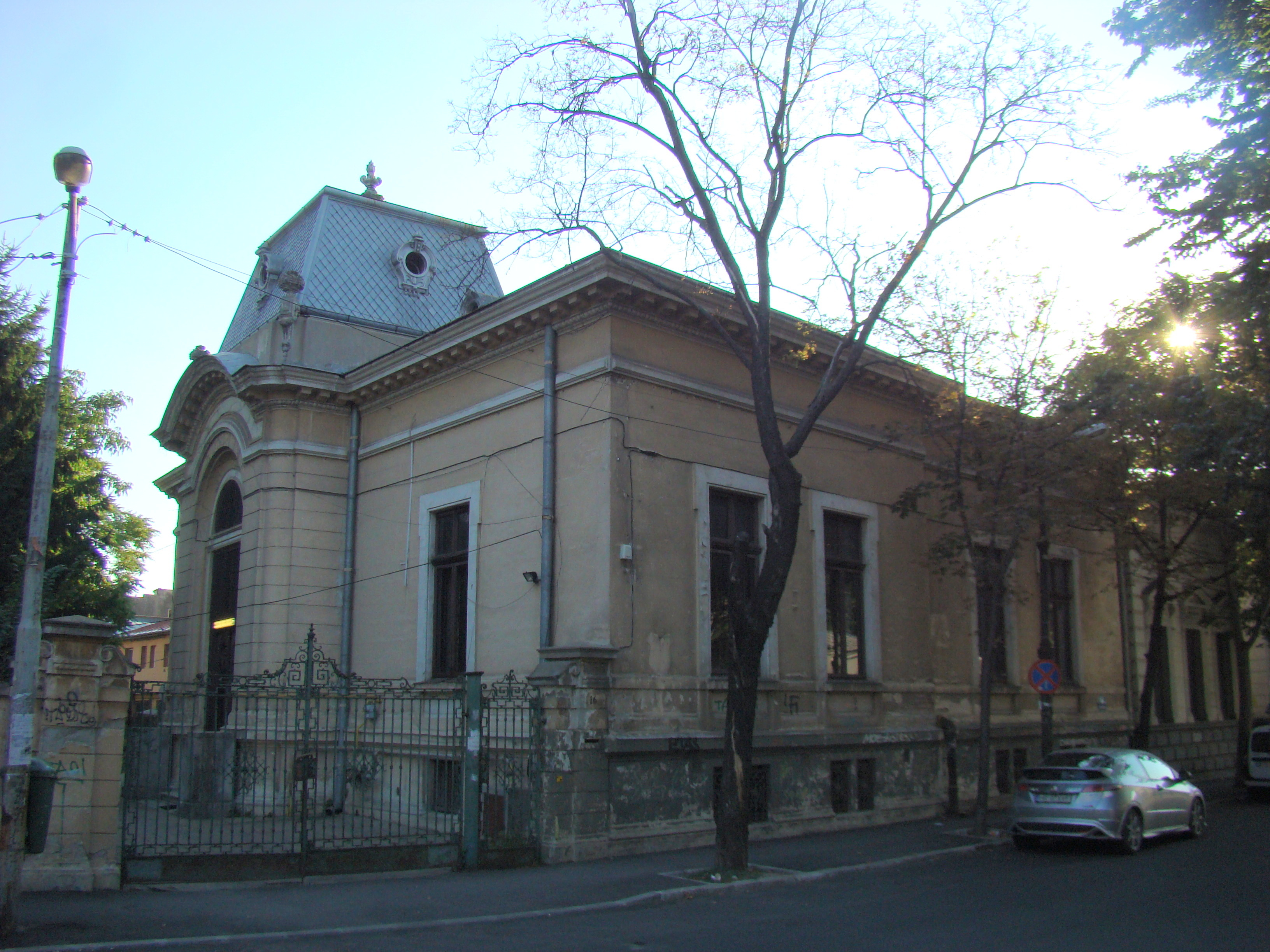 Casă monument istoric, str. Constantin Budișteanu, nr.16 (Muzeul Cornel Medrea)